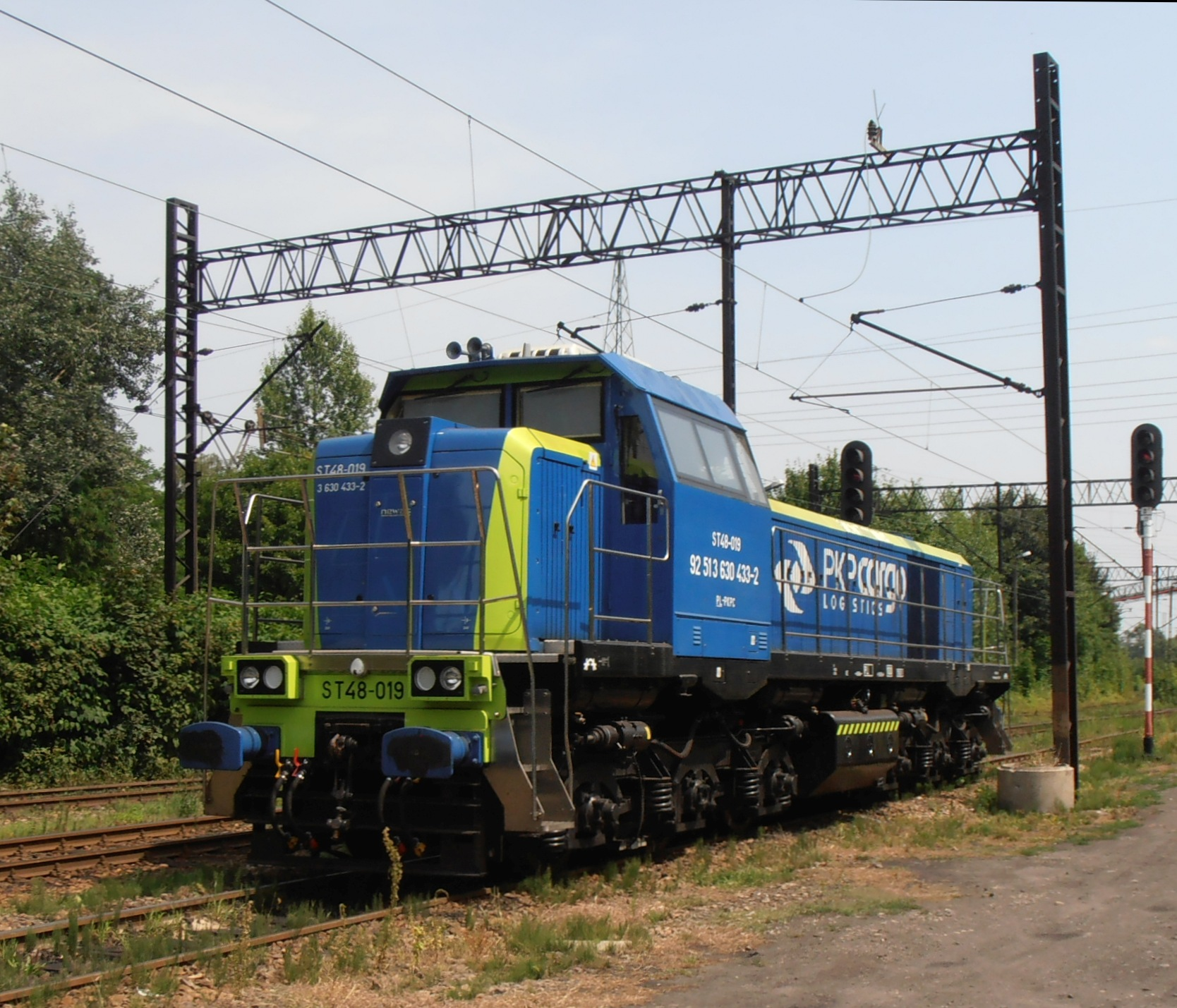 ST48-019 „parkująca” w okolicy stacji kolejowej w Rydułtowach.